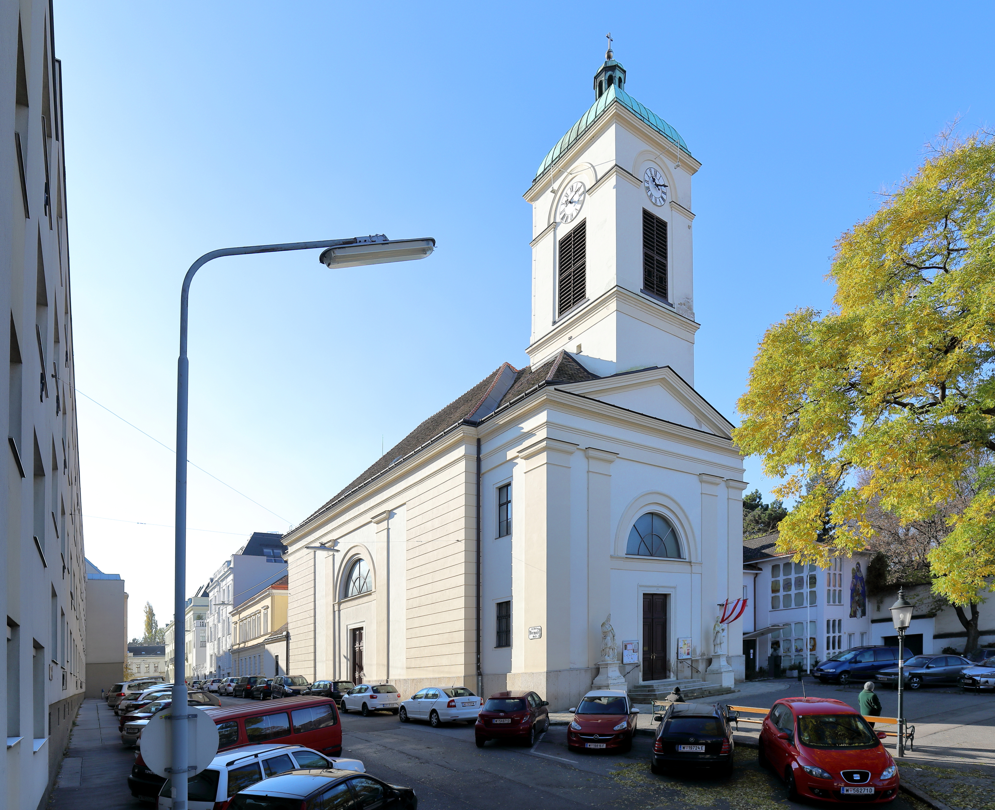 Nordostansicht der röm.-kath. Pfarrkirche hl. Paulus (Döblinger Pfarrkirche), im 19. Wiener Bezirk Döbling.Die Kirche mit kuppelgedecktem Fassadenturm wurde anstelle einer baufälligen Vorgängerkirche von 1826 bis 1829 durch Baumeister Josef Reininger in klassizistischen Formen errichtet. Vor der Kirche befinden sich Steinfiguren des hl. Erasmus (frühes 18. Jhdt.) und des hl. Johannes Nepomuk (um 1800).